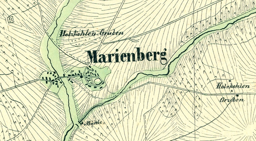 "Holzkohlegruben" (Braunkohlebergwerke) bei Bad Marienberg im Westerwald. Ausschnitt aus: Karte vom Herzogthum Nassau : von den im Jahr 1819 geschehenen Aufnahmen längs der Preussischen und Hessischen Gränzen etc. ; orientirt nach Parallelen vom Meridian und Perpendikel von Paris, [o.O.] 1819 Blatt 8: Kirburg [1 : 20000]